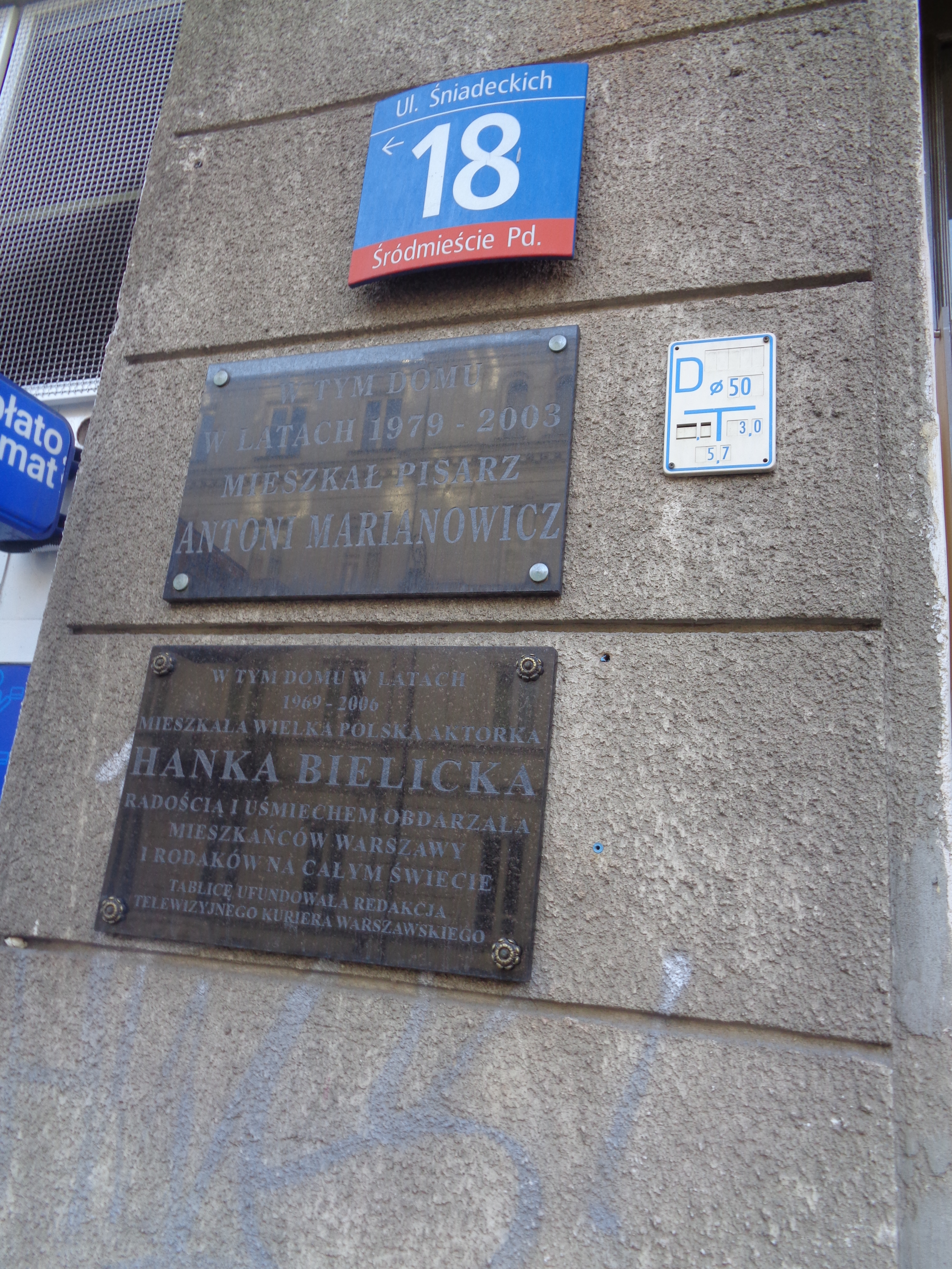 Tablica upamiętniająca Miejsce zamieszkania Anny Weroniki Bielickiej i Antoniego Marianowicza.